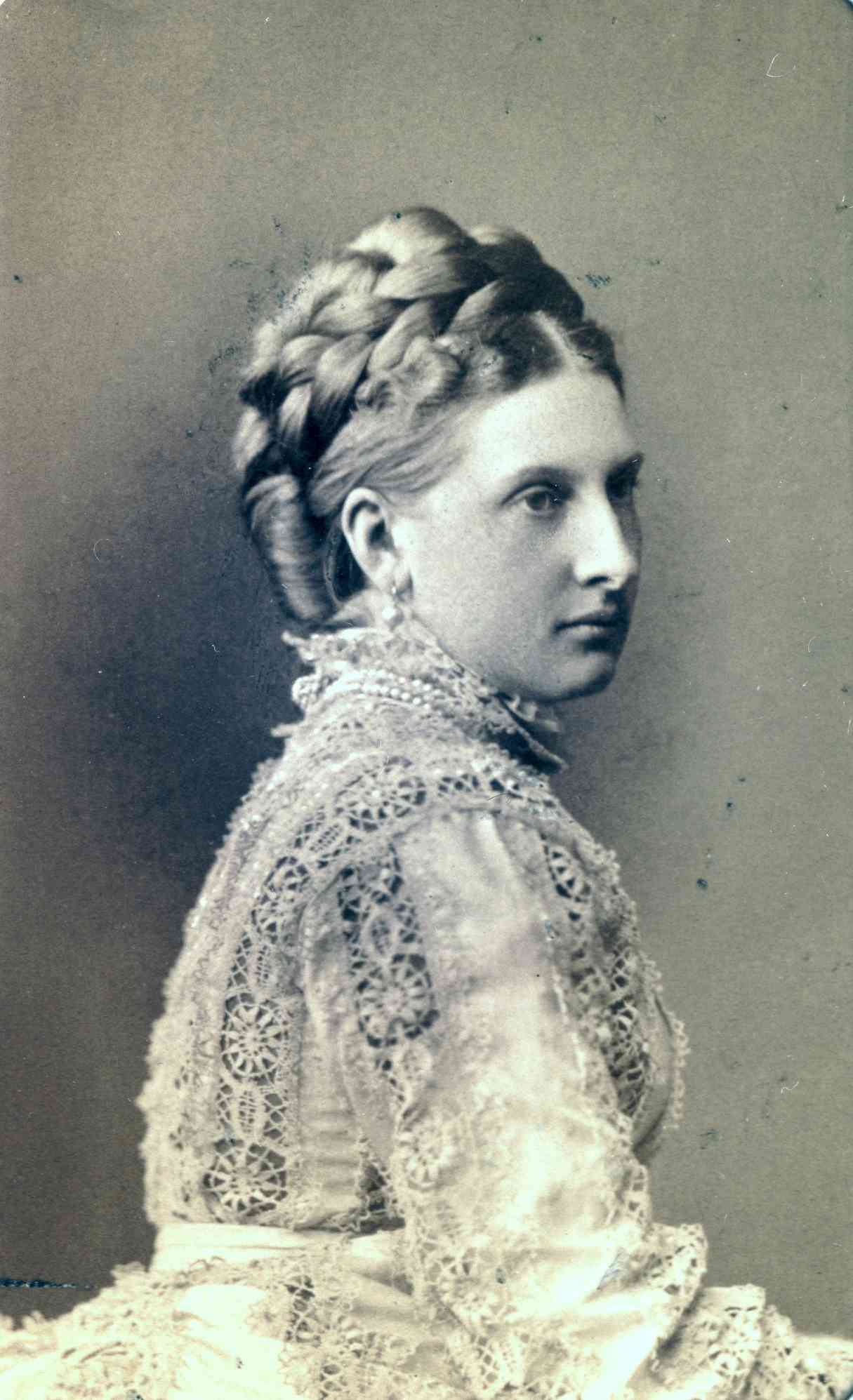 Princesse Antonia de Hohenzollern, née infante de Portugal.